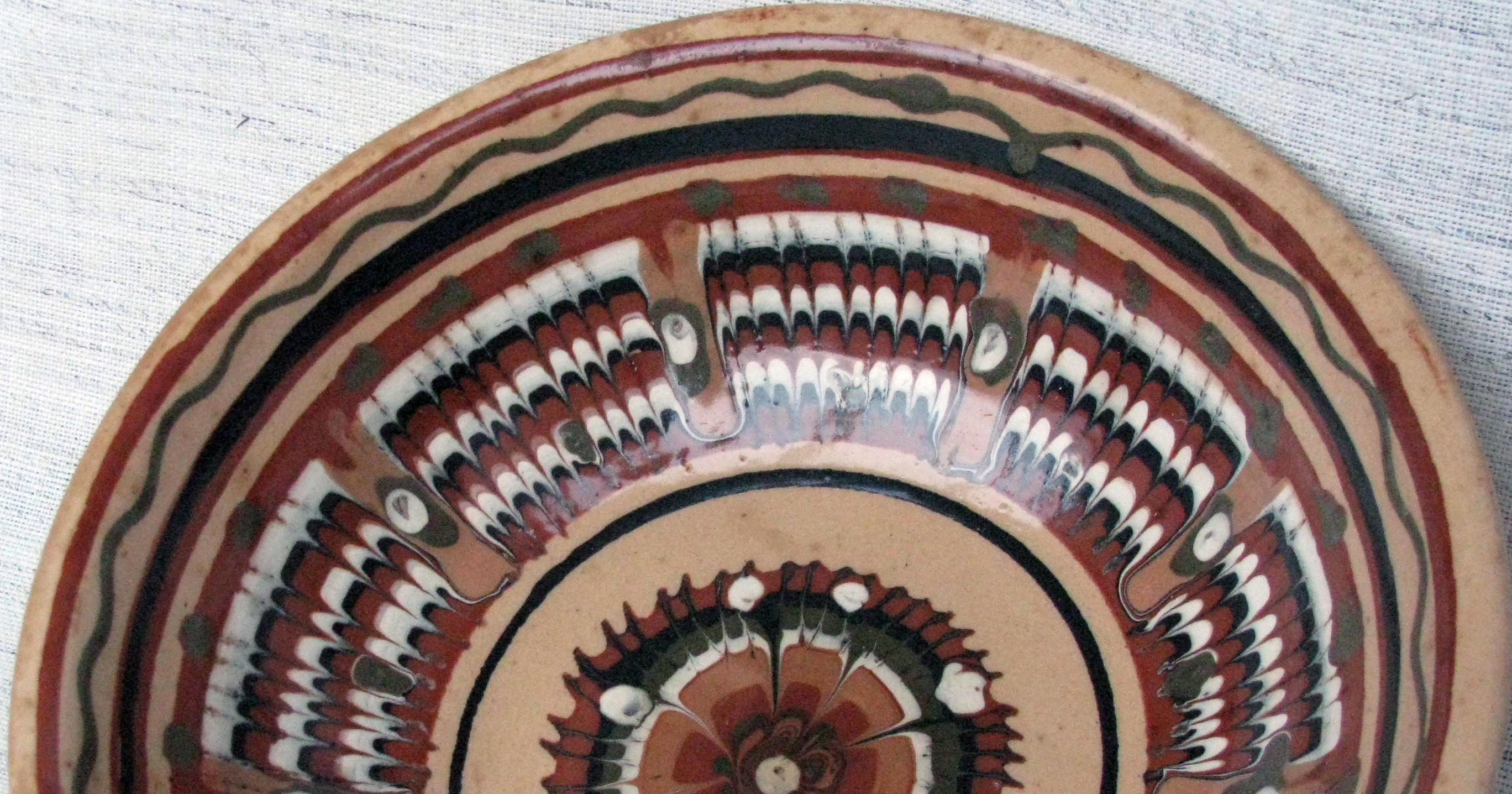 Фляндрування